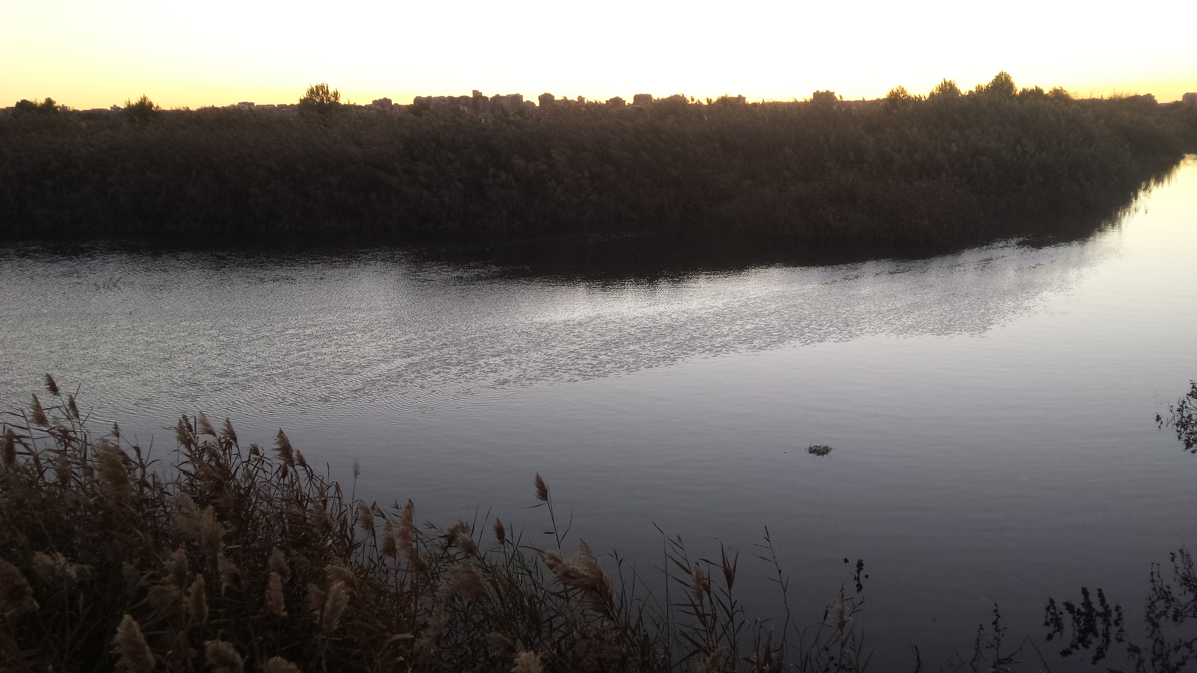 Canal de María Cristina al norte de la ciudad de Albacete